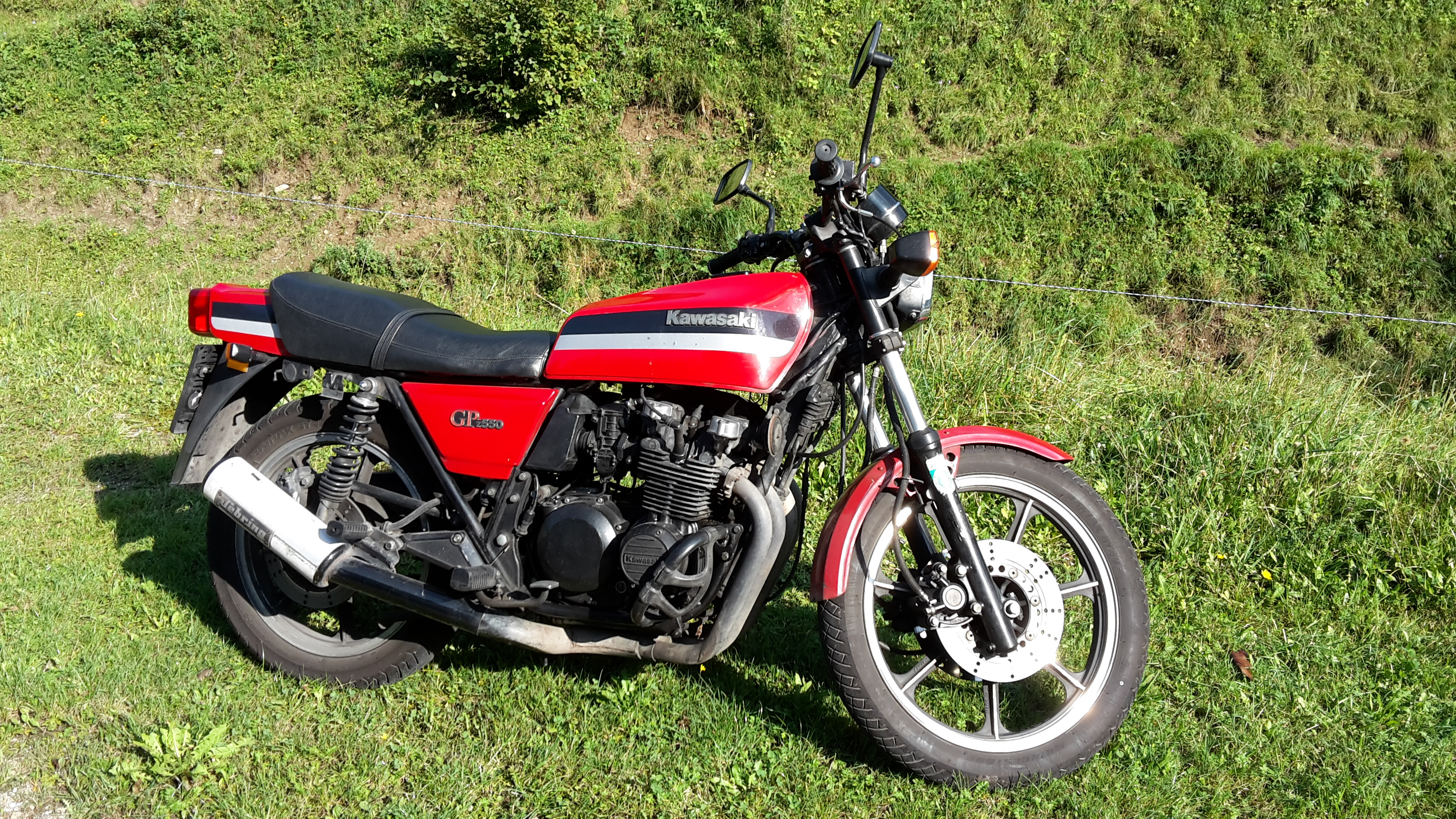 Kawasaki GPZ GP 550 Z (KZ 550 D), Erstzulassung: 1982-05-21